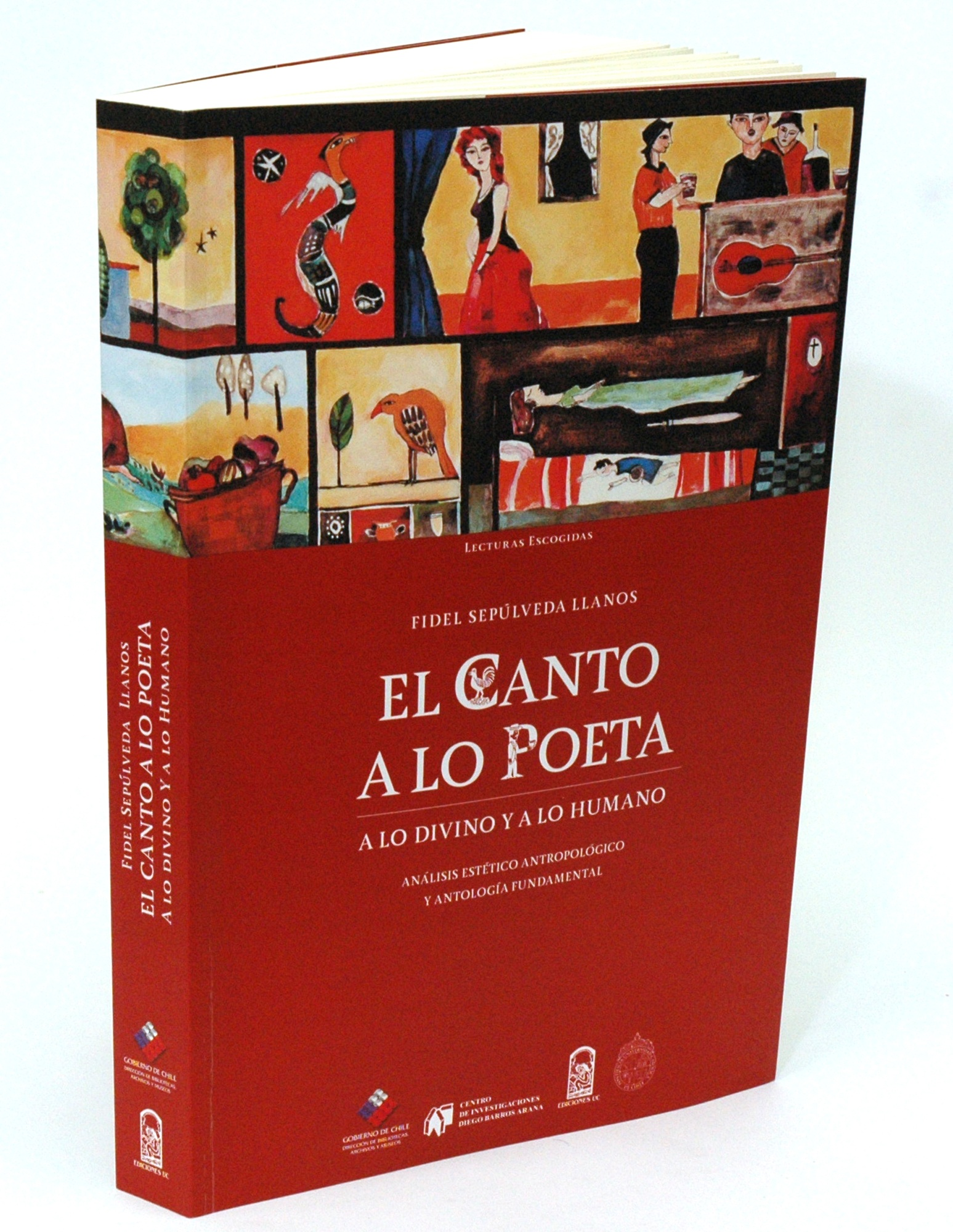 El Canto a Lo Poeta: A lo Divino y a lo Humano. Análisis estético antropológico y antología fundamental. Fidel Sepúlveda Llanos. Ediciones Pontificia Universidad Católica de Chile y Dirección de Bibliotecas, Archivos y Museos de Chile (DIBAM). Santiago. 2009. 581 páginas.